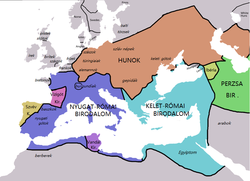 Európa és a Mediterráneum az 5. század közepén